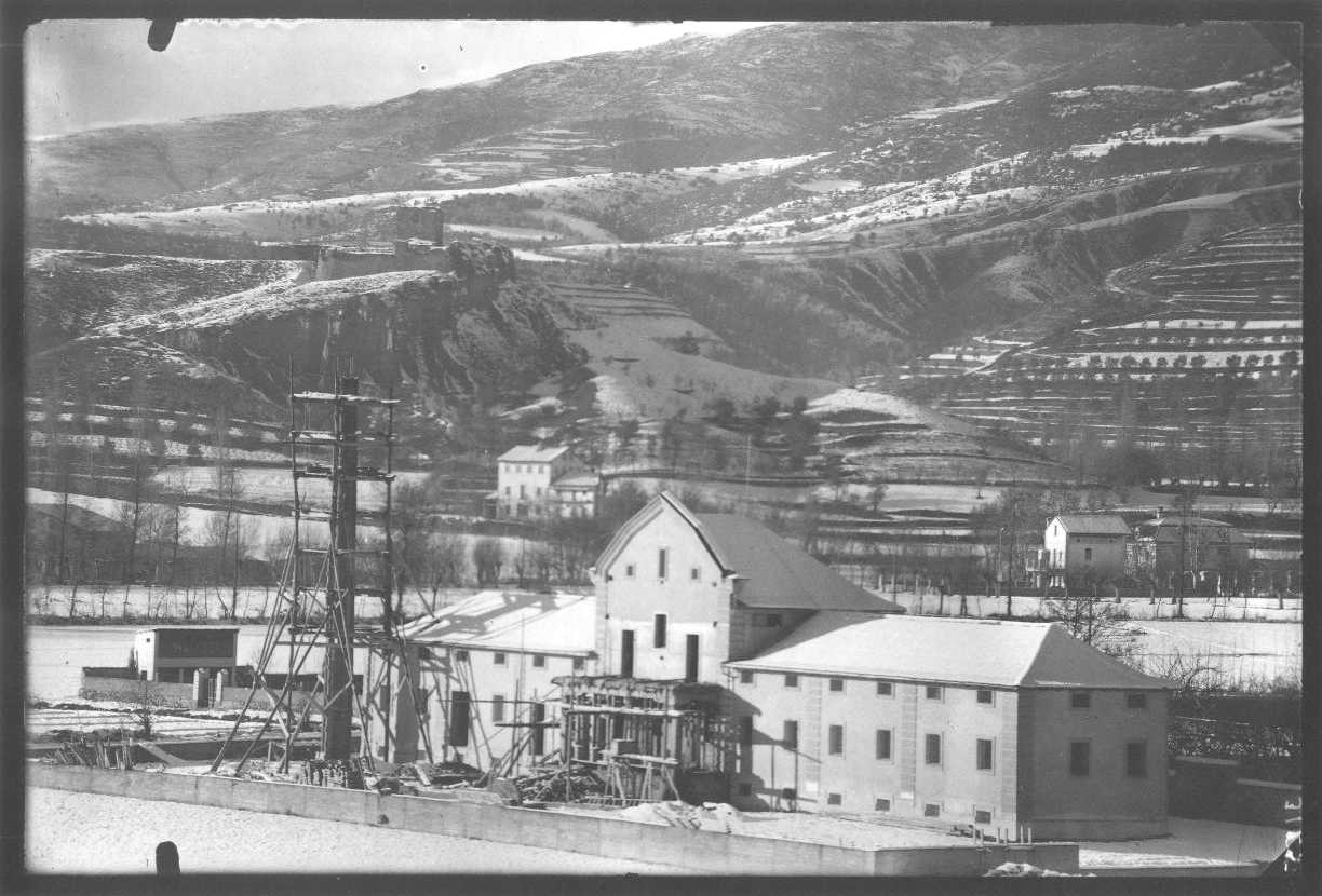 Construcció de les antigues Lleteries de la Seu d'Urgell, avui ja desaparegudes.